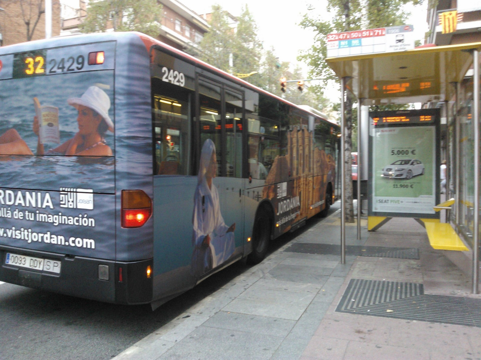 Autobús urbà de Barcelona